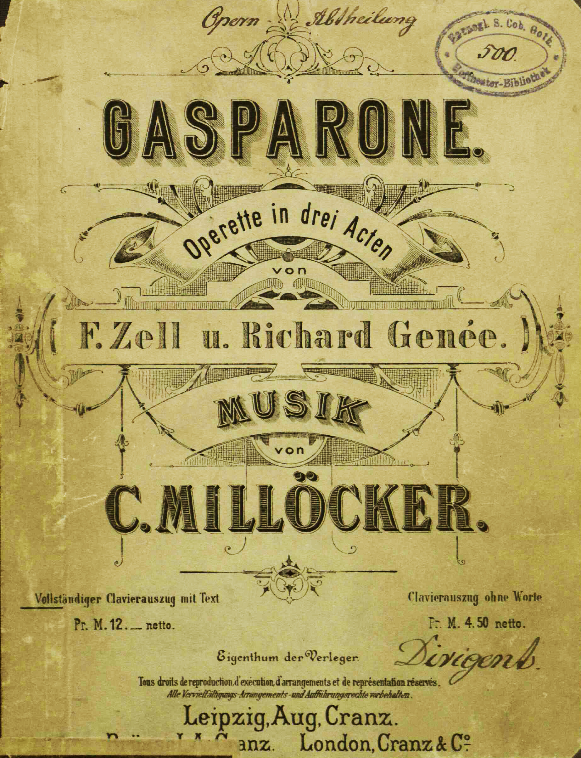 Gasparone. Libretto cover